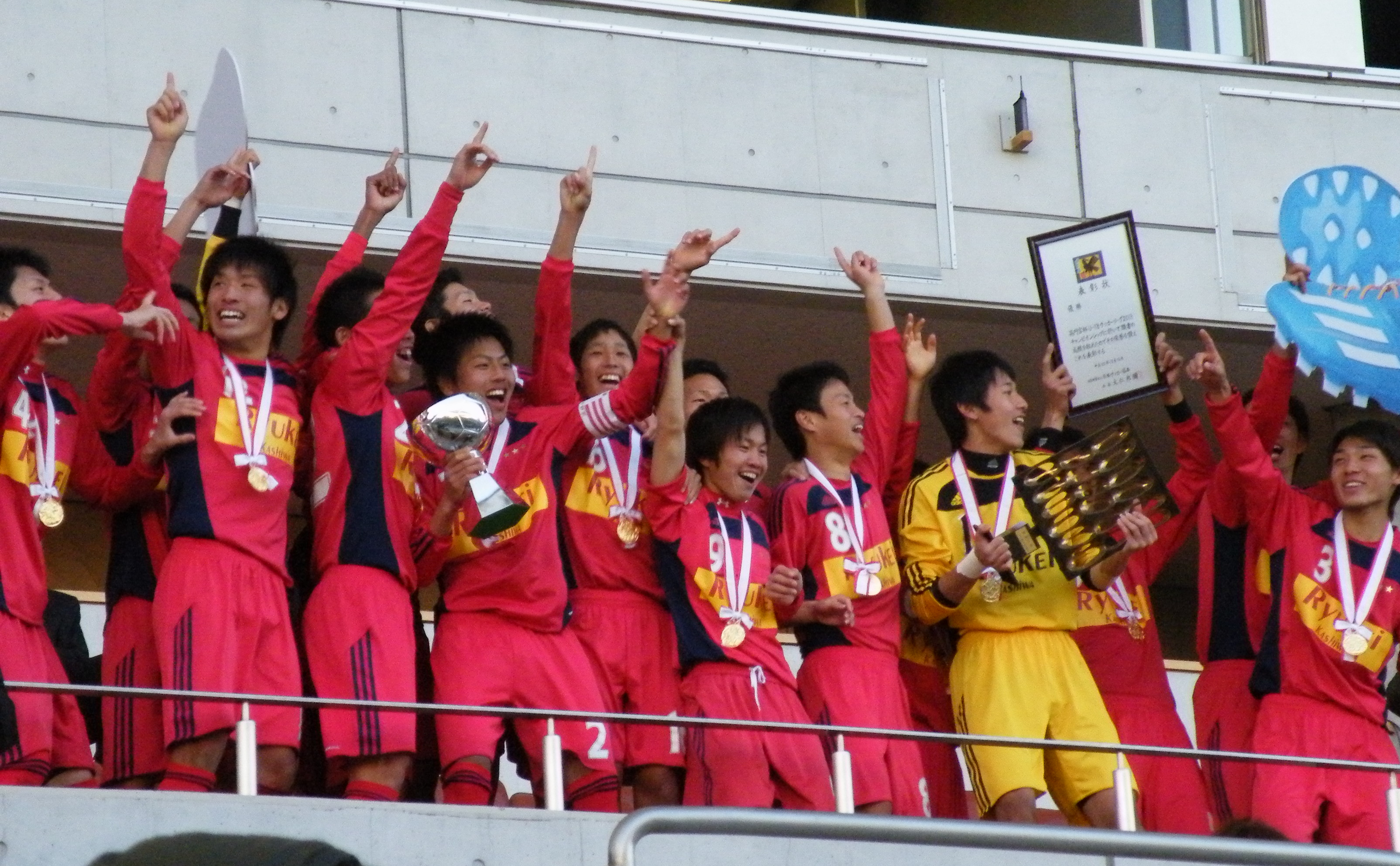 高円宮杯U-18サッカーリーグ2013チャンピオンシップにて優勝を祝う流通経済大学付属柏高等学校の選手たち。